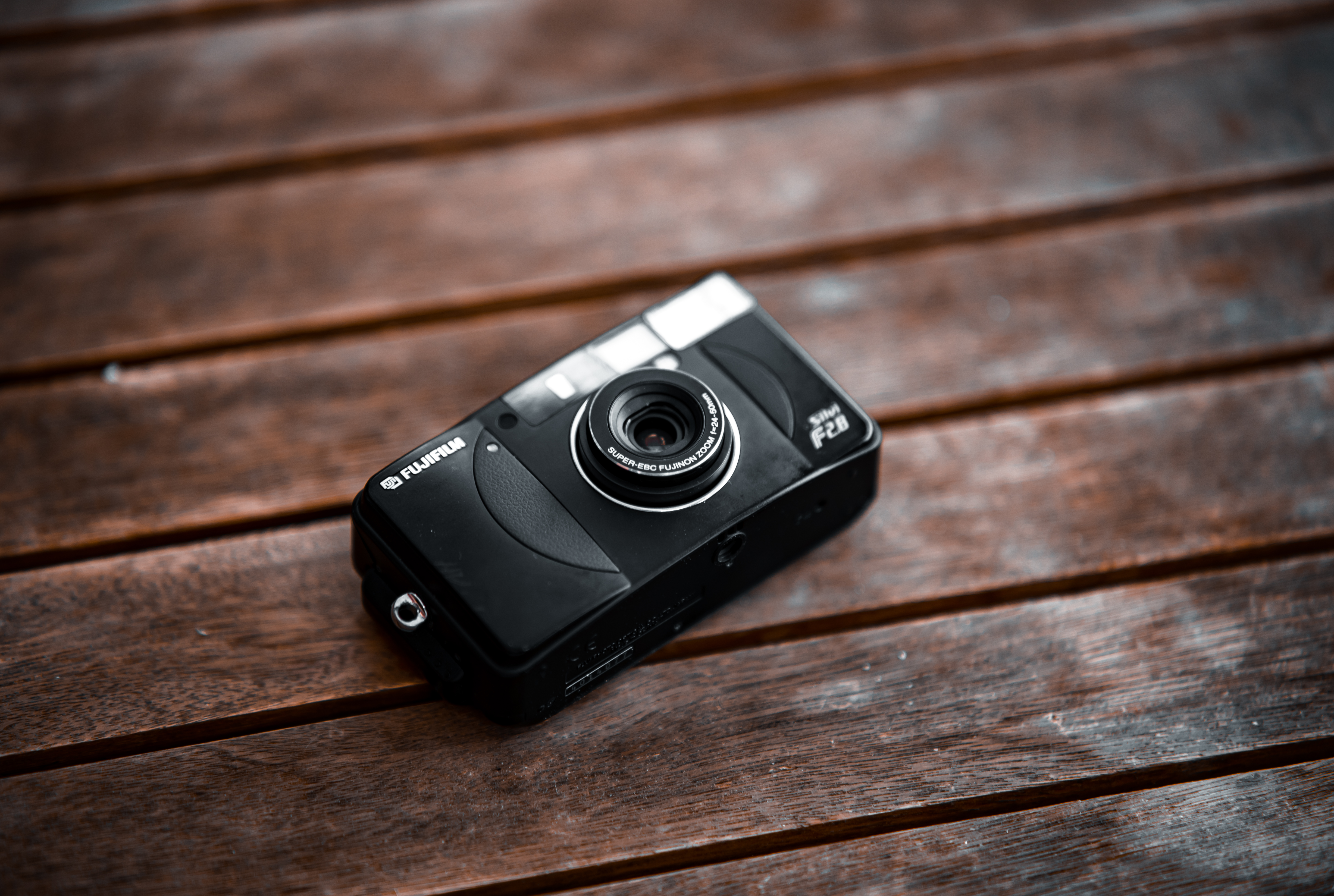 Vorderseite der Fujifilm Silvi F2.8 Black Edition, die es nur in Japan gab